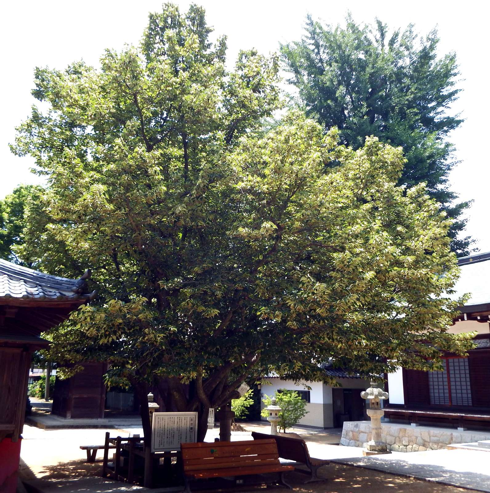 八栗寺の菩提樹